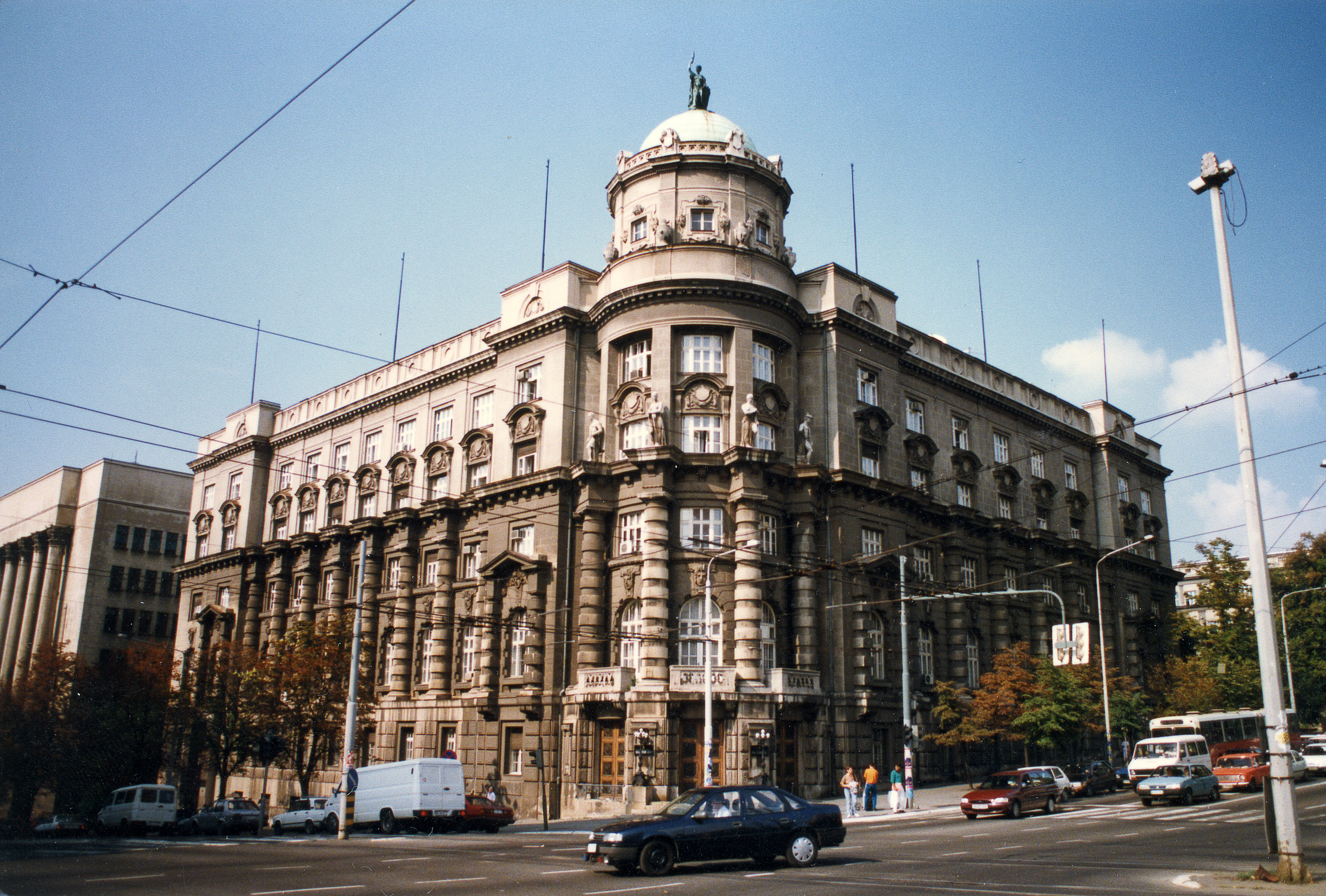 Данас зграда Владе Србије. Снимак из 1995, пре него што је оштећена у НАТО бомбардовању 1999.